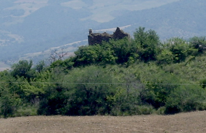 Veduta dei ruderi della Torre di Scudellano (GR)